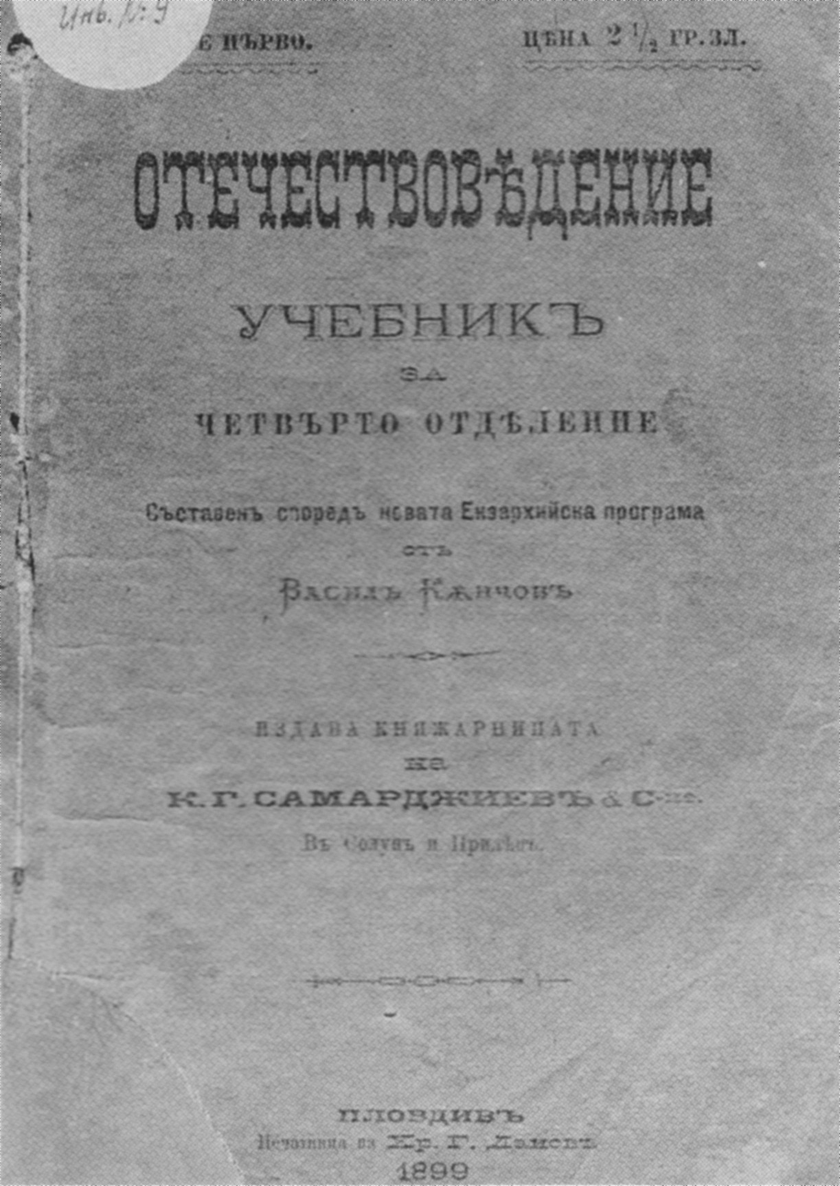 "Отечествоведение", учебник, съставен от Васил Кънчов според новата Екзархийска програма. Пловдив, 1899 (корица)